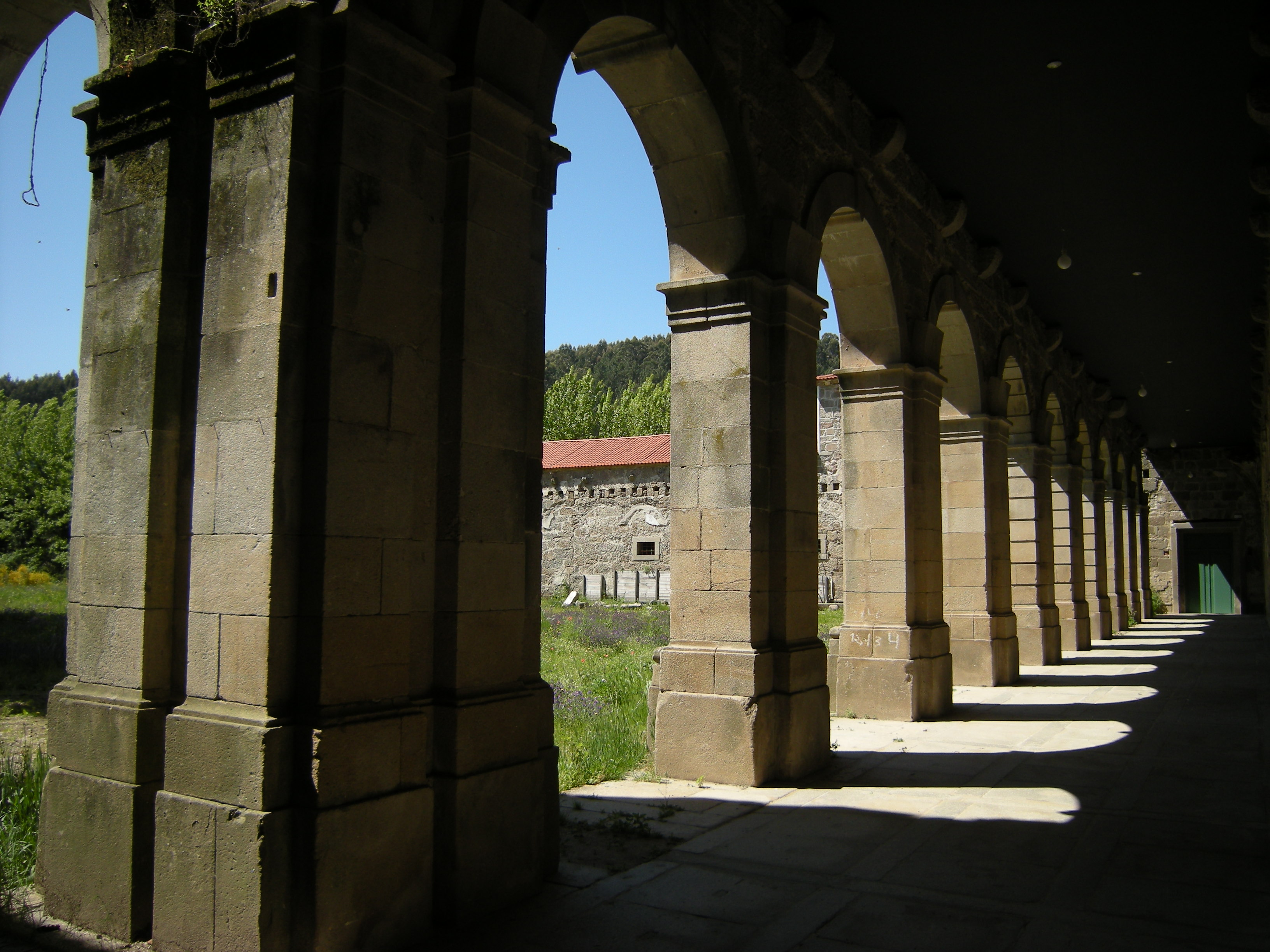 Monasterio de Santa Maria de Pombeiro